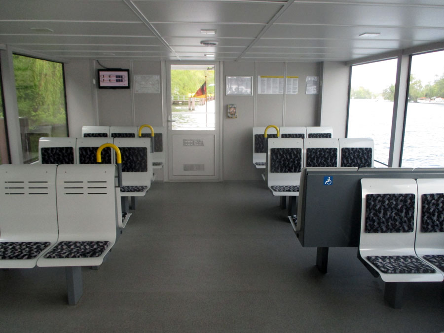 Fahrgastraum des 2013 gebauten Schiffs Fährbär am Berliner Wilhelmstrand.